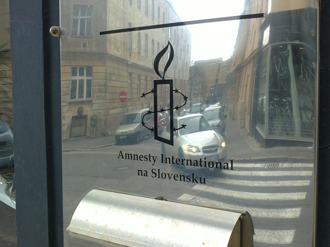 Amnesty International Slovensko